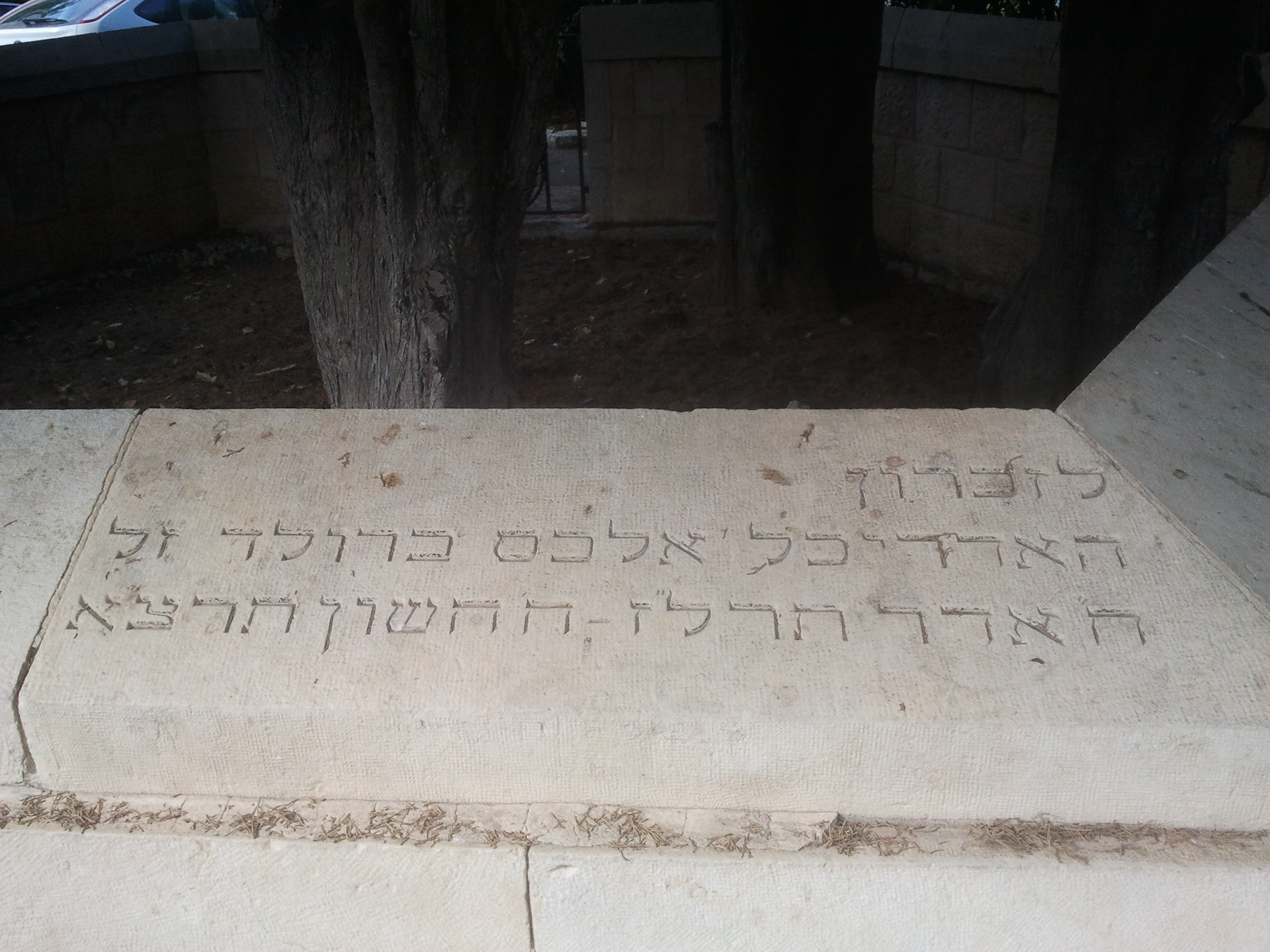 כתובת על האנדרטה לזכרו של אלכסנדר ברוולד במרכז הכרמל